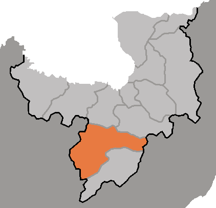 Map of Punso, Ryanggang-do, DPRK, 2006